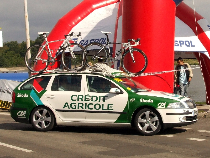 Piąty etap 64. Tour de Pologne: Września - Świdnica Licensing: This image or multimedia was created by Bartosz Senderek. The image or audio is licensed under CC-BY license. Attribution to me is required. Licencja: Ten obrazek lub plik multimedialny został stworzony przez Barotsza Senderka. Został on udostępniony na licencji CC-BY. Informacja o moim autorstwie jest wymagana. "I want to use the image/multimedia. How can I do that?" You can use this image/multimedia freely for any purpose, including commercial use, provided that you license it under the above license. My suggestion is to use text shown below: If you use the image I would appreciate it if you would let me know on my talk page, but this is not required as long as you follow the above license. "Chcę użyć tego pliku. Jak mogę to zrobić?" Możesz używać tej grafiki/multimediów darmowo w każdym celu, włączając użycie komercyjne, udostępniając go dalej na powyższej licencji. Jeśli zdecydujesz się na publikację zdjęcia mojego autorstwa obowiązkowo podpisz go w sposób podany w sekcji "Licensing text". Jeżeli użyłeś mojego pliku możesz powiadomić mnie o tym na mojej stronie dyskusji, lecz nie jest to wymagane, dopóki trzymasz się powyższej licencji.